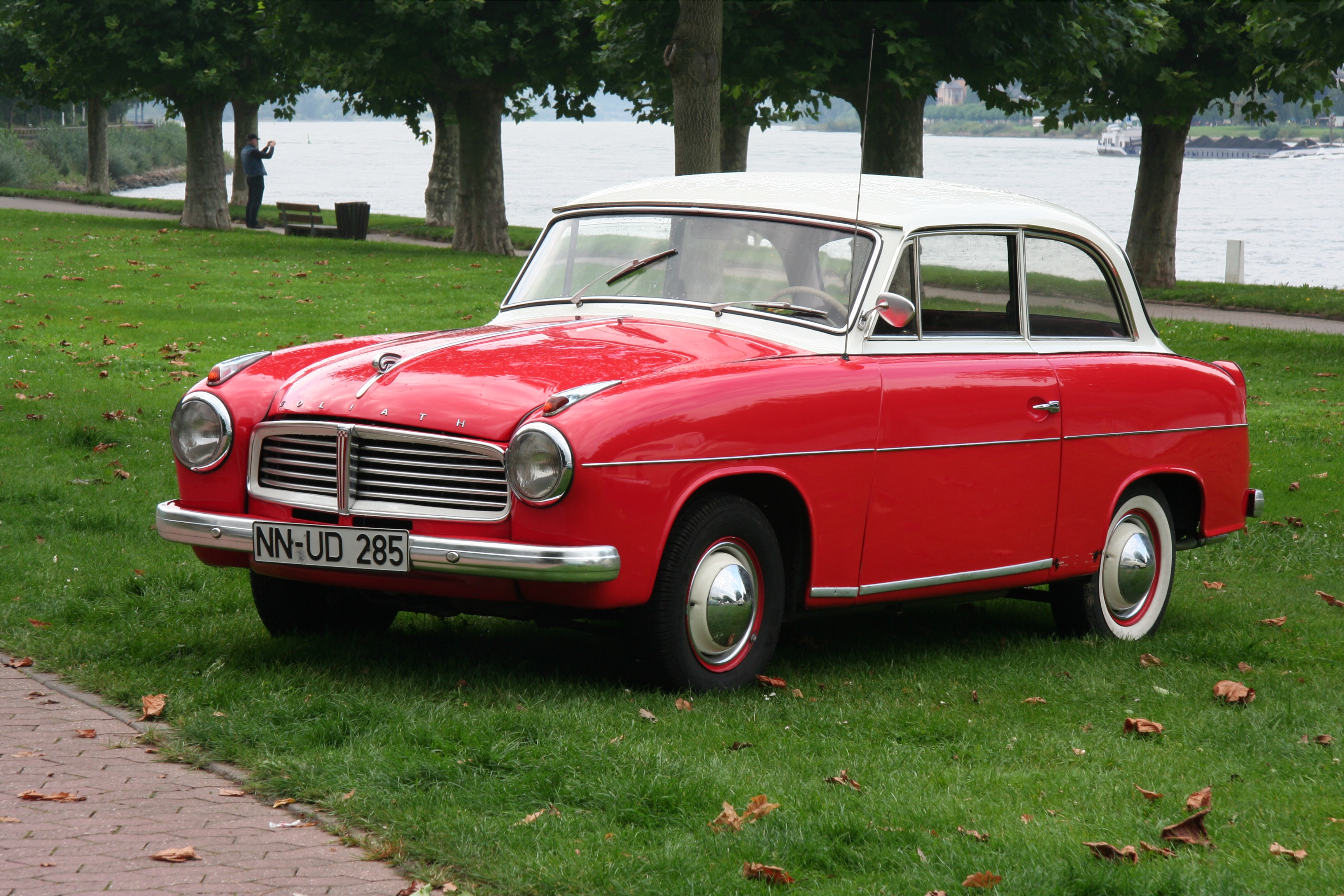 Goliath 1100, gebaut von 1957 bis 1958, danach bis 1961 als Hansa 1100. Motor: 4-Zylinder-Boxer, 4-Takt, 1093 cm³, 40 PS bei 4250/min; Kennzeichen des abgebildeten Fahrzeugs verändert